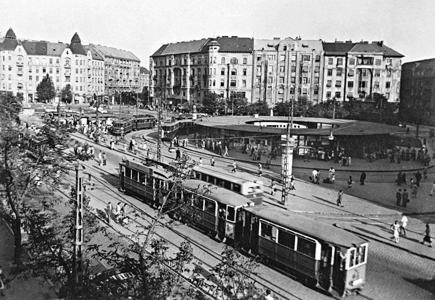 A Móricz Zsigmond körtér az 1950-es évek vége felé. A Gomba körül fordult meg a törökbálinti HÉV.